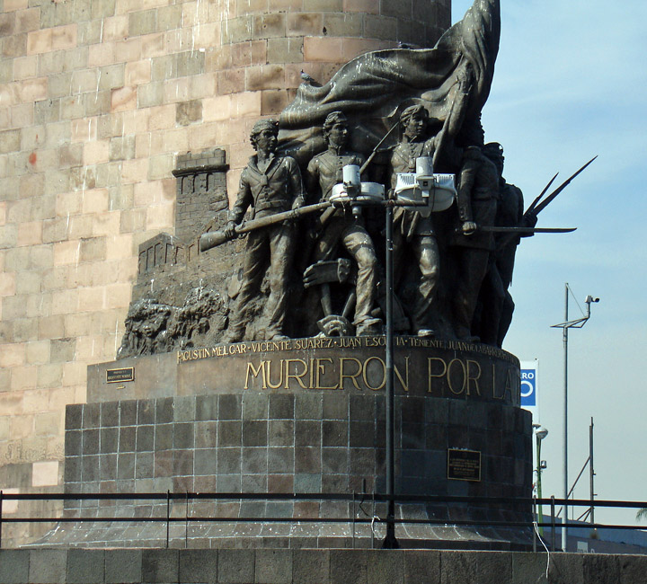 Monumento a los Niños Heroes en Guadalajara, Jalisco.